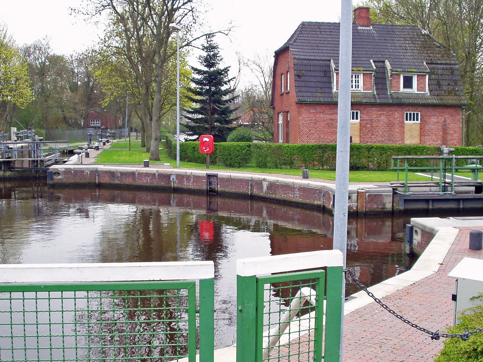 Ansicht der Kesselschleuse in Emden, Blick nach Süden